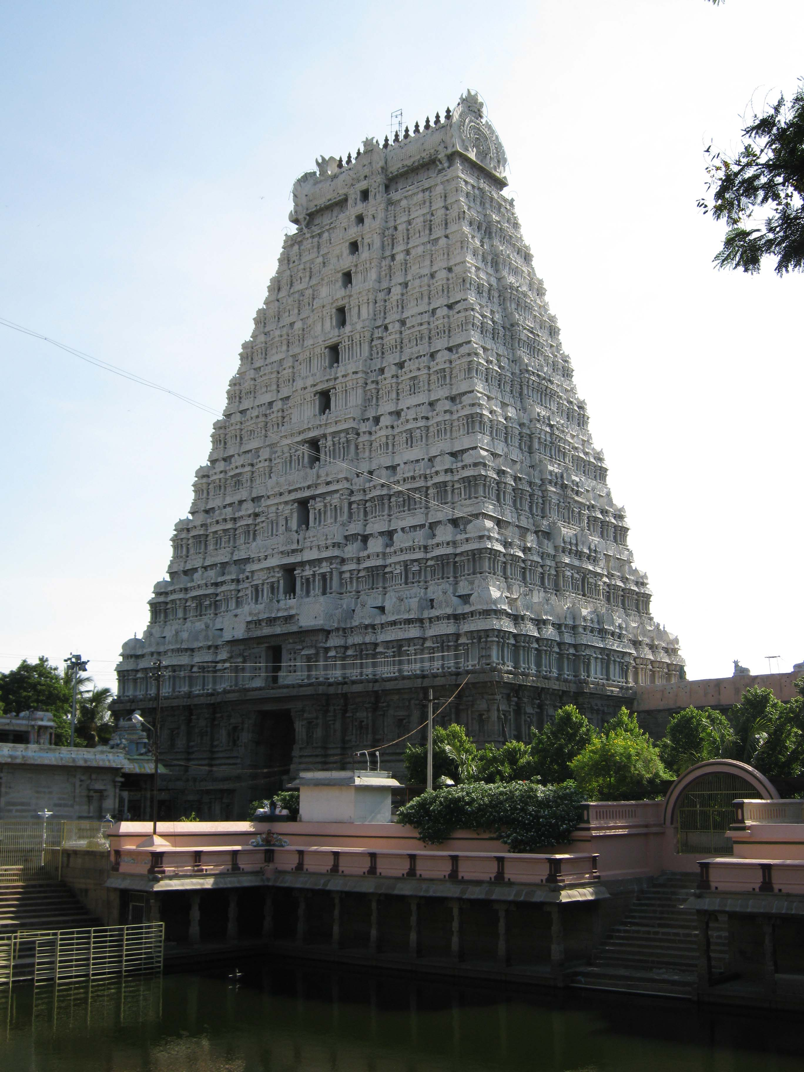 Tiruvannamalai Temple Tower